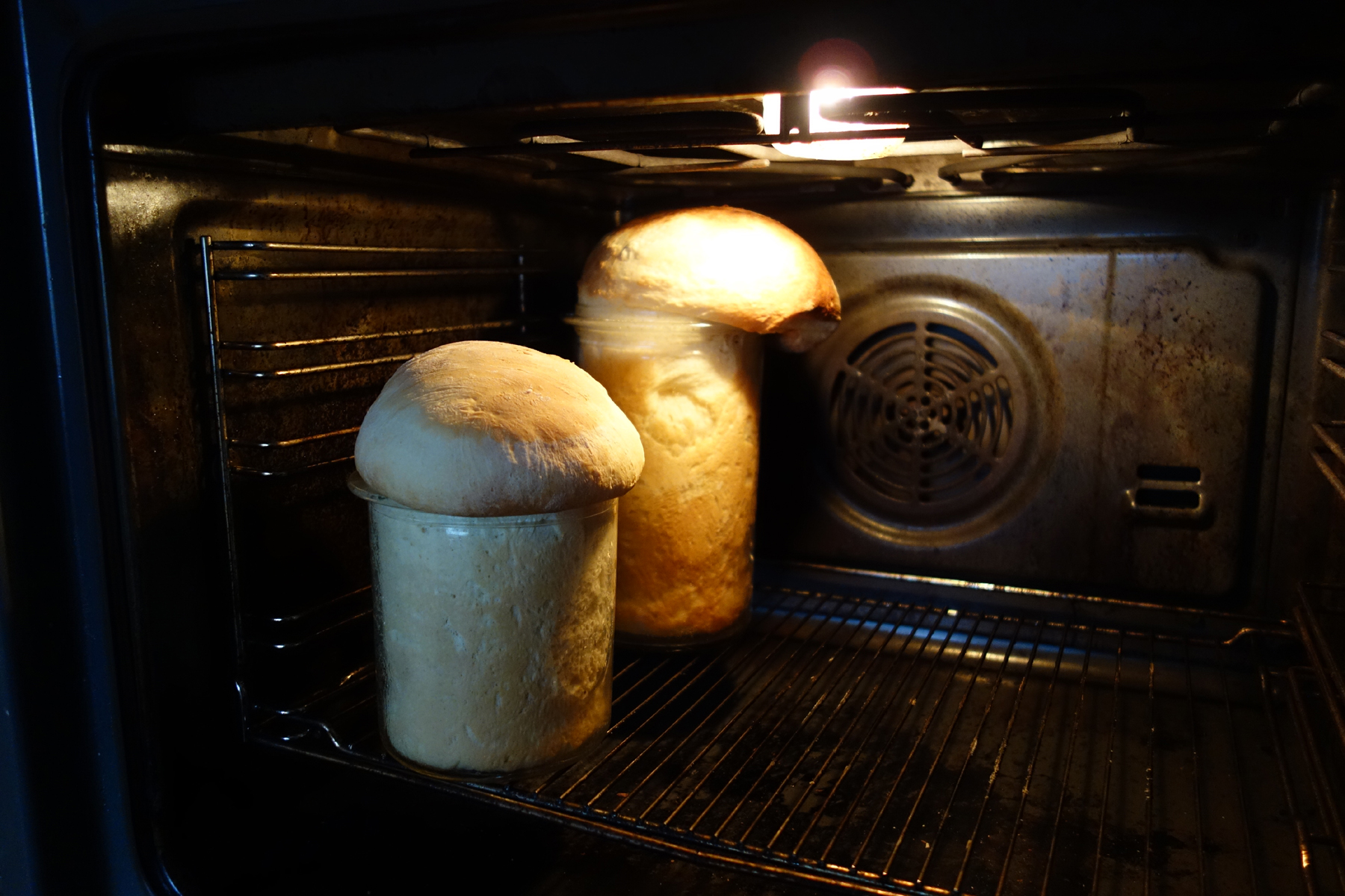 Frisch gebackenes Osterbrot in Einmachglas.